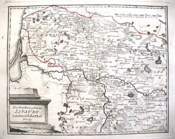 Des Großherzogthums Litauen nordwestlicher Theil. Nro. 49. Kolorierter Kupferstich